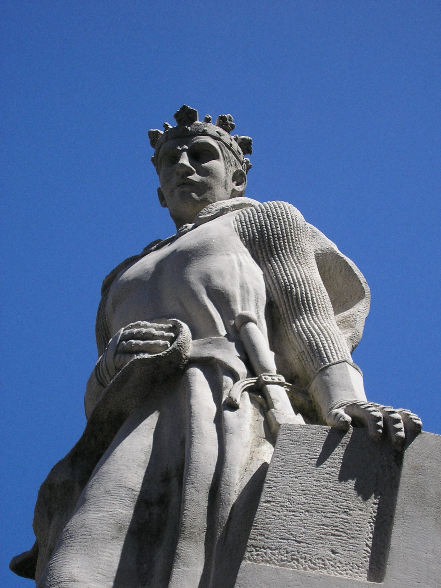 Estatua de Alfonso XI en Algeciras, Andalucía, España